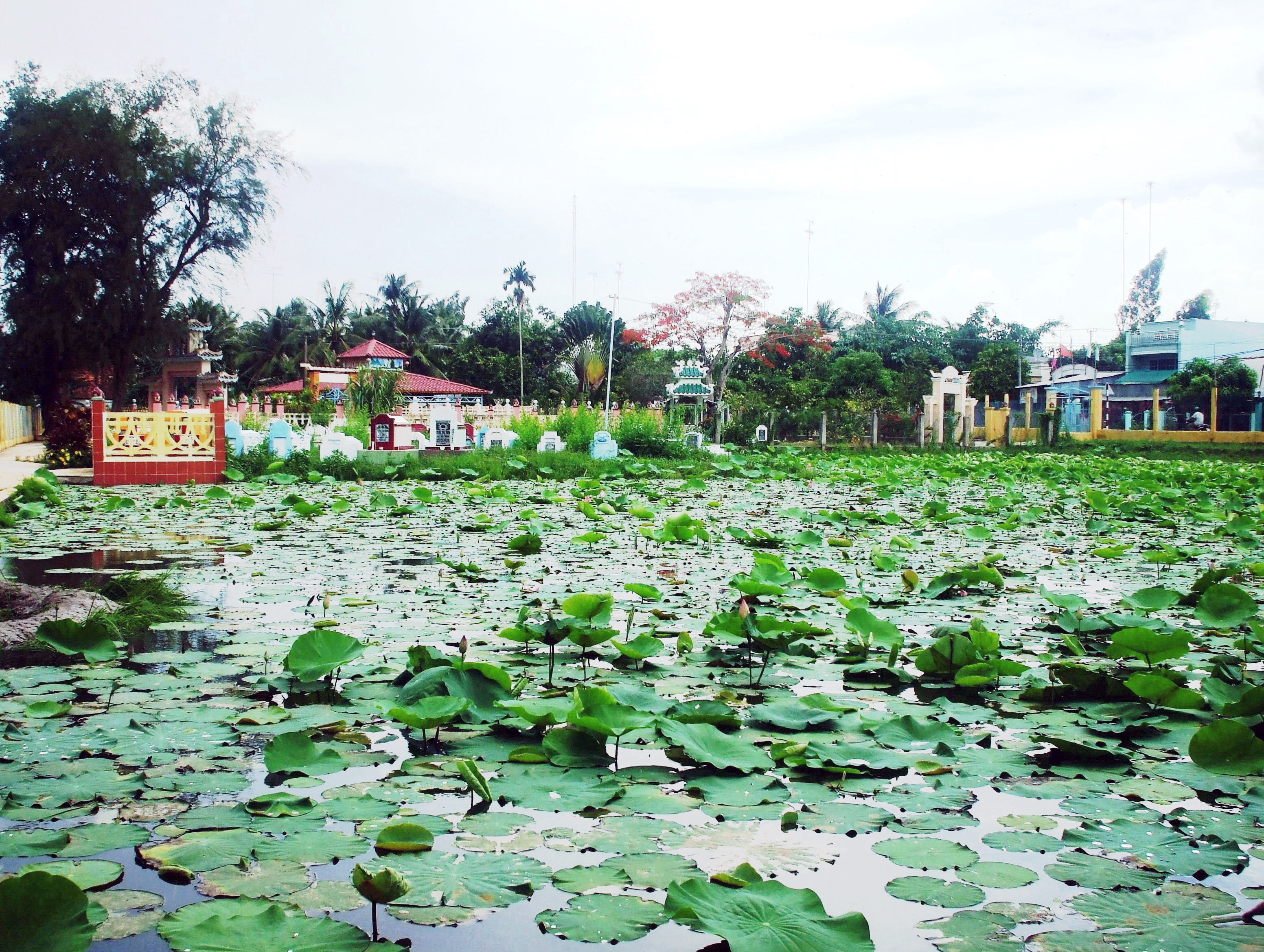 Bàu sen ở phía trước miễu Bà Chúa Xứ Bàu Mướp thuộc thị trấn Nhà Bàng (Tịnh Biên, An Giang, Việt Nam).